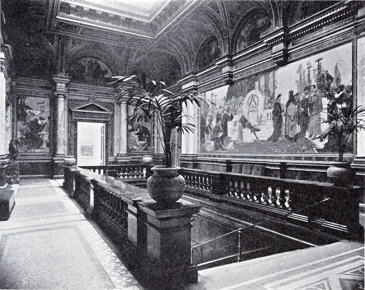 Kunsthalle_in_Düsseldorf,_erbaut 1878 bis 1881 von Ernst Giese und Paul Weidner, Treppenhaus.jpg